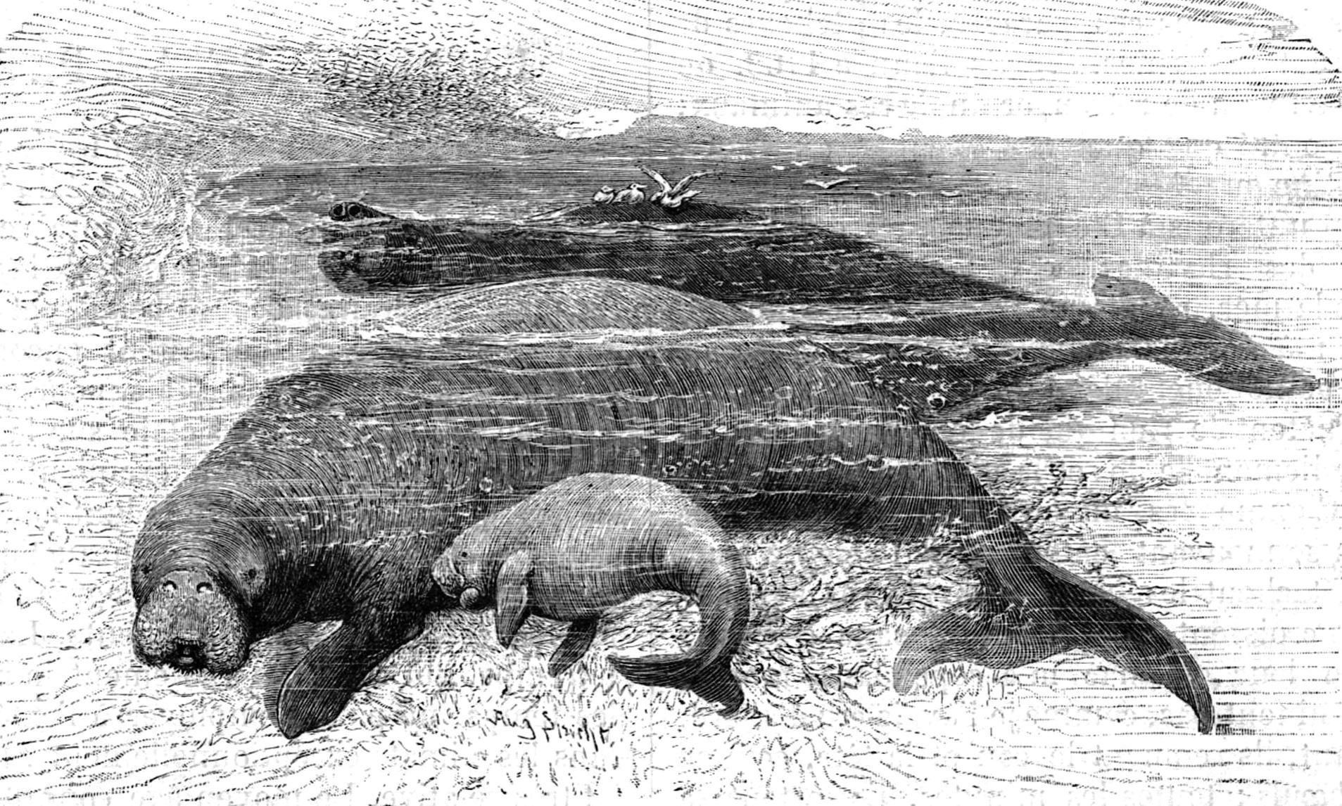 "Un mammifère récemment disparu. - Le rhytine boréal".